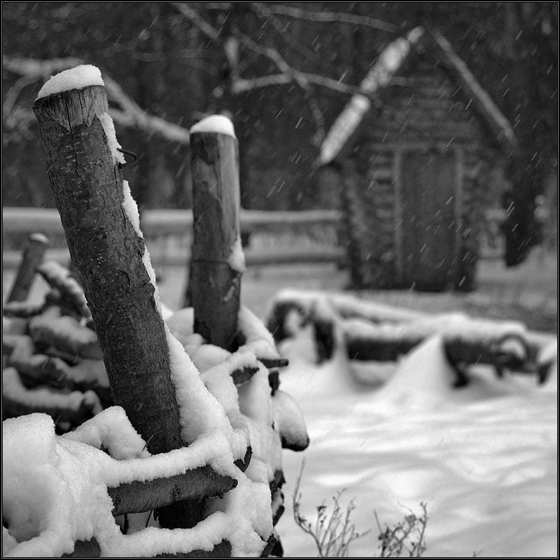 Ковпаківський, Котелевський р-н, західна околиця смт. Котельва, Котелевське л-во, кв. 40, 42, 47, 48, 53, 54 (у визначених виділах)